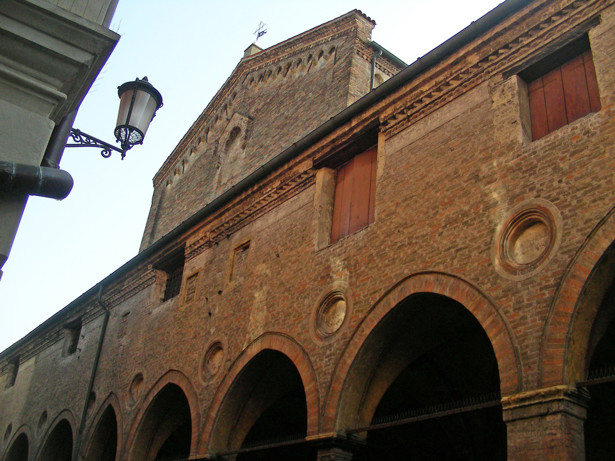 Padova, chiesa di San Francesco